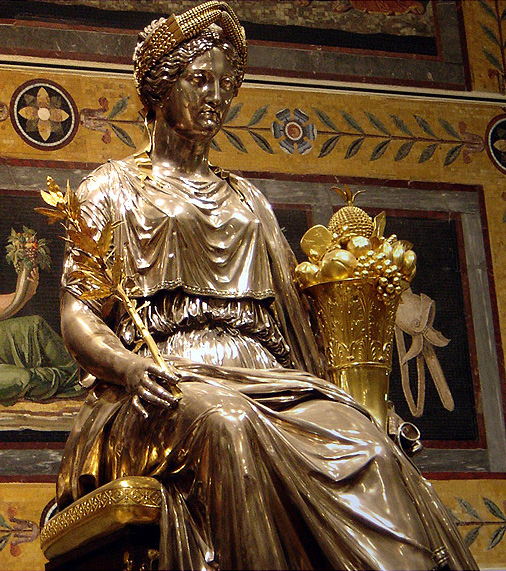 Sculpture commandée pour commémorer la paix d'Amiens (1802). La statue tient dans sa main une branche d'olivier symbole de paix (à l'origine : un caducée, remplacé vers 1832 par le bronzier Pierre-Maximilien Delafontaine). Ainsi qu'une corne d'abondance et elle porte une couronne d'épis symboles de la prospérité suivant la paix.